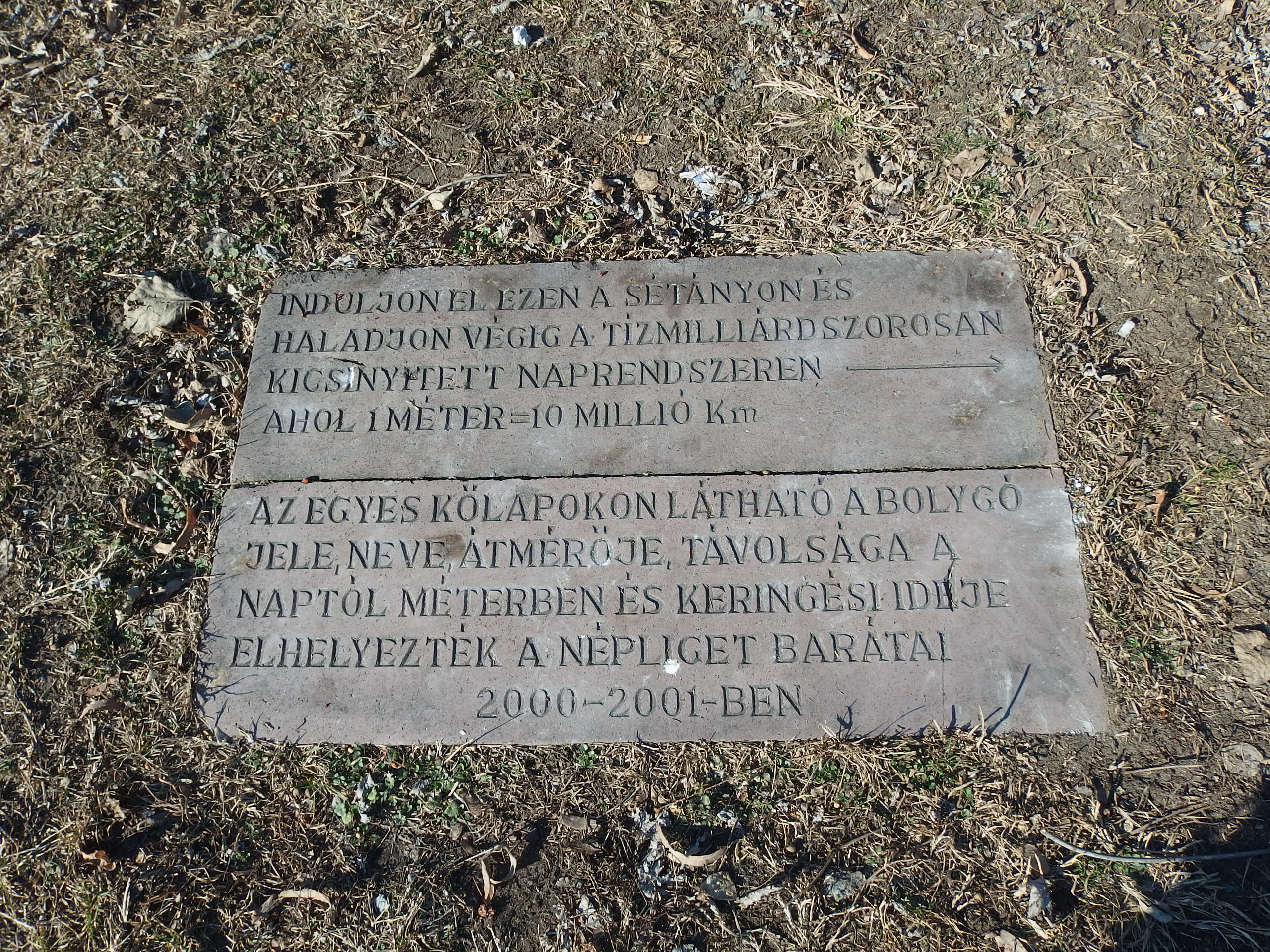 A Sétáló Naprendszer kiindulópontja a Népligetben (Budapest)